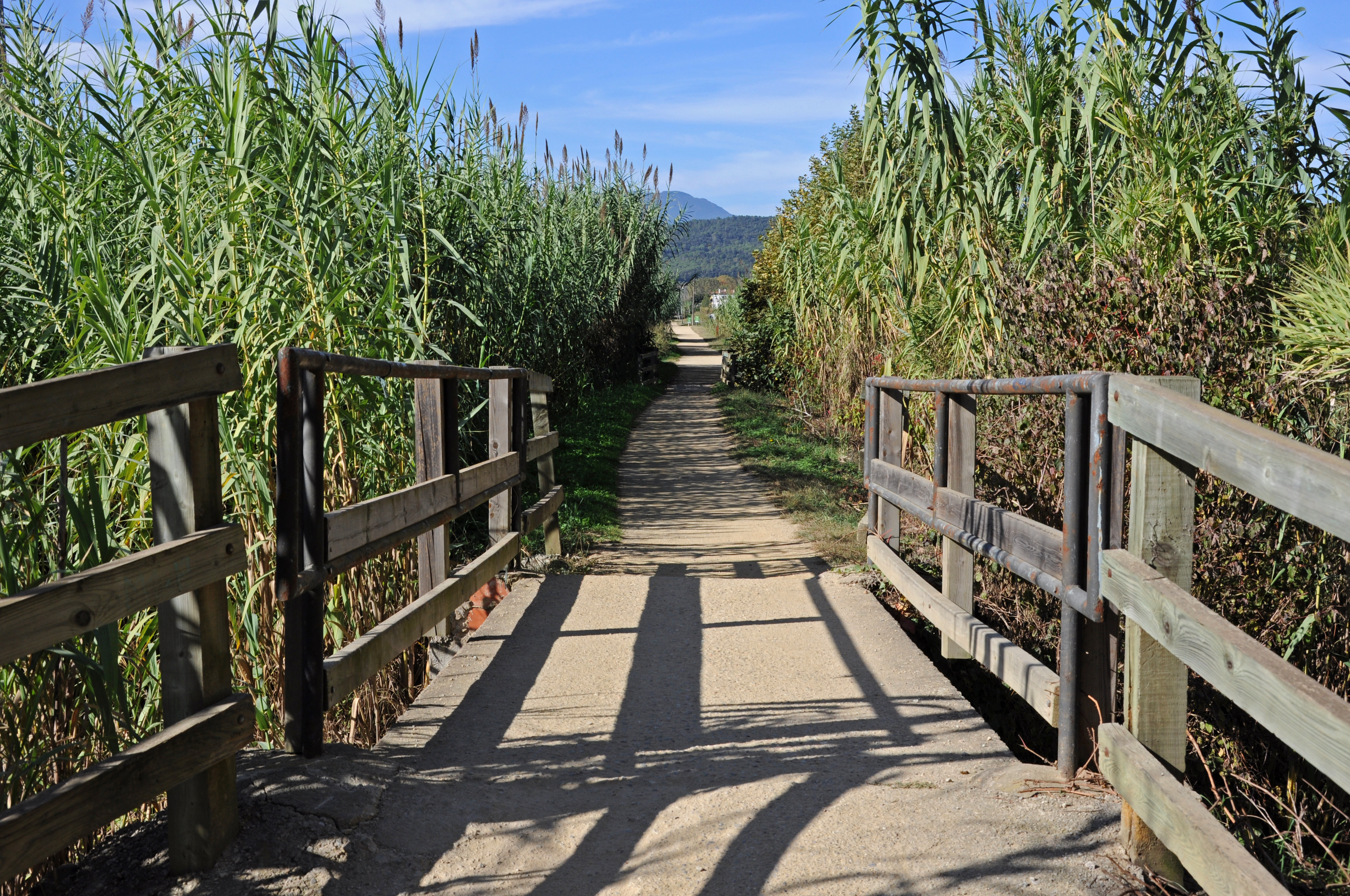 Traçat de l'antic Carrilet de Girona a Olot (Bescanó)